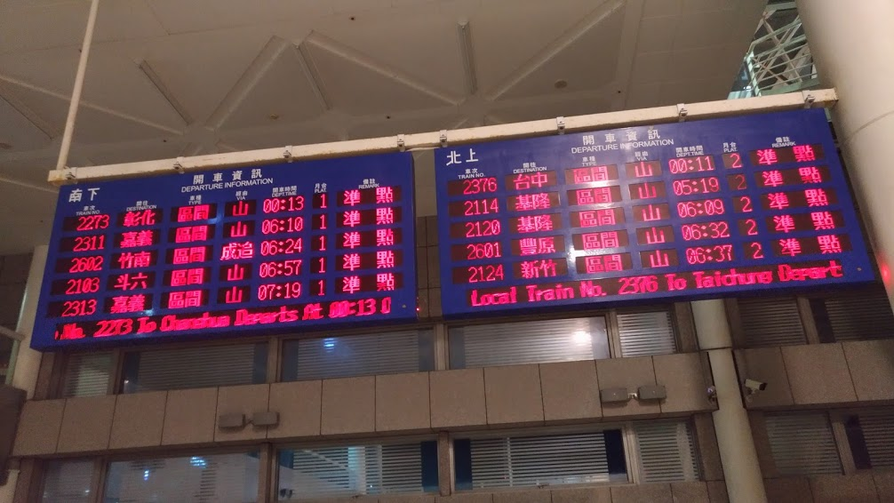 臺灣鐵路管理局新烏日車站開車資訊顯示器。